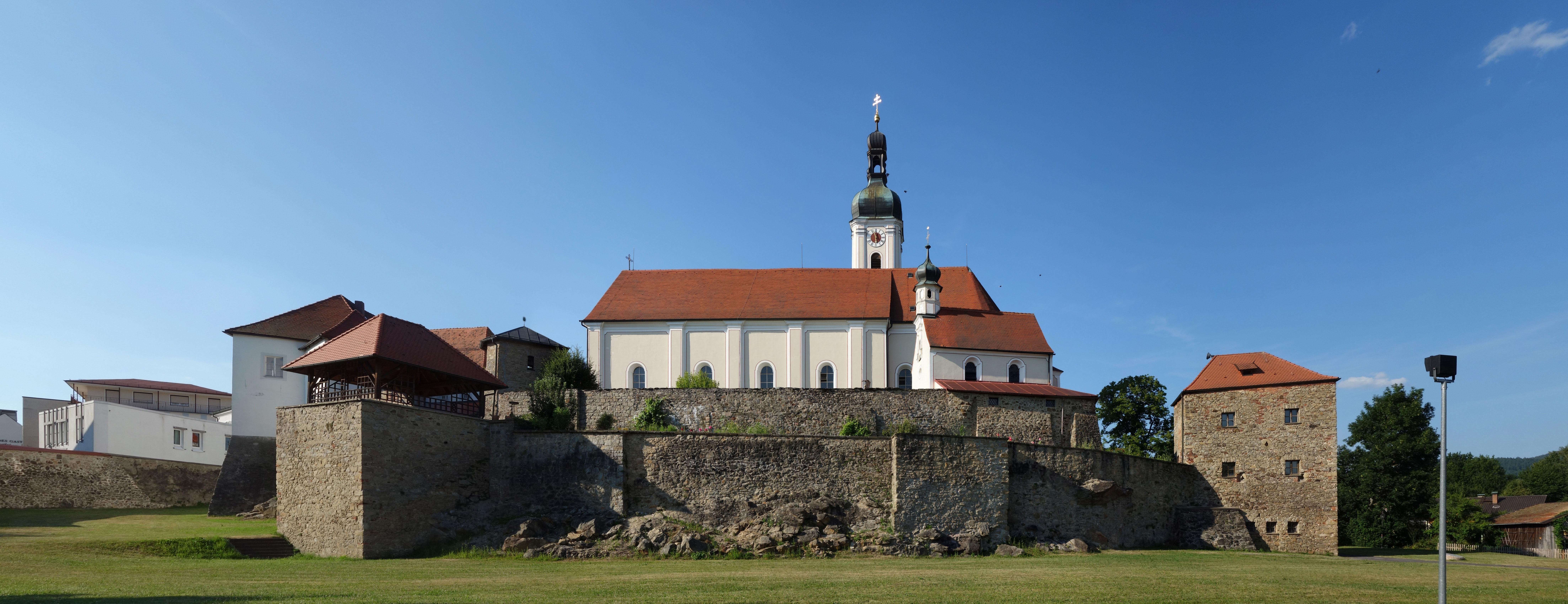 Die Stadtpfarrkirche Mariä Himmelfahrt befindet sich in der Stadt Bad Kötzting im Bayerischen Wald. Sie ist mit einer Wehranlage mit äußerer Ringmauer, Graben und innerem Befestigungsring umgeben. Die Kirche, die 1179 in einer Papsturkunde erwähnt wurde, wurde 1737/38 erweitert, Chor und Turm 1766/69 neu errichtet. This image was created with Hugin.